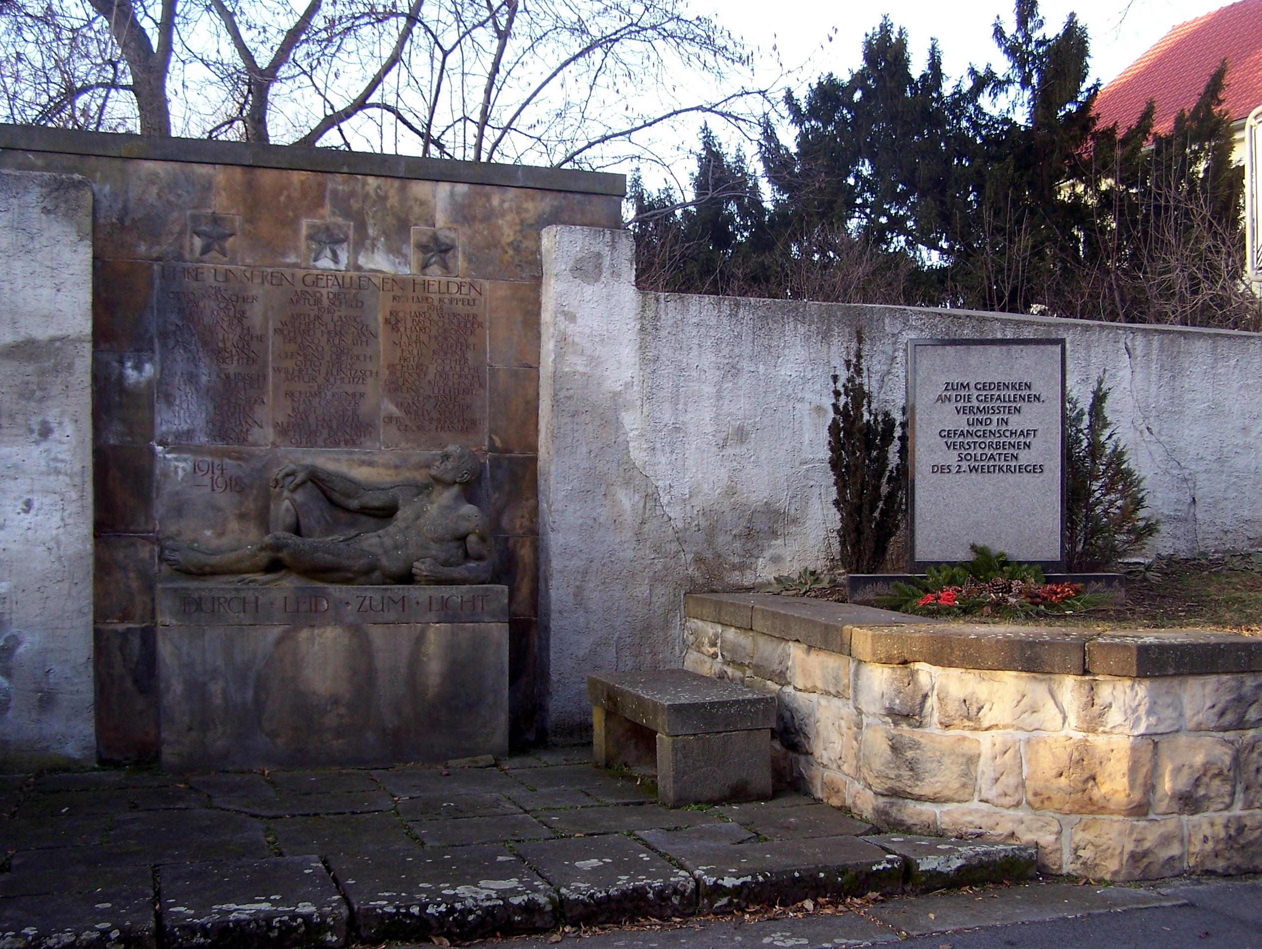 Denkmal für die Gefallenen des Ersten Weltkriegs (links) und Gedenktafel "zum Gedenken an die gefallenen, vermissten und in Gefangenschaft verstorbenen Soldaten des 2. Weltkriegs (rechts). Niederau, Landkreis Meißen